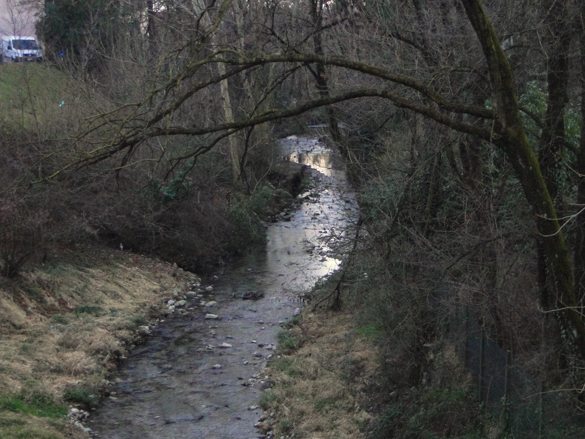 Torrente Nesa, Nese, fraz. di Alzano Lombardo (BG), Italia